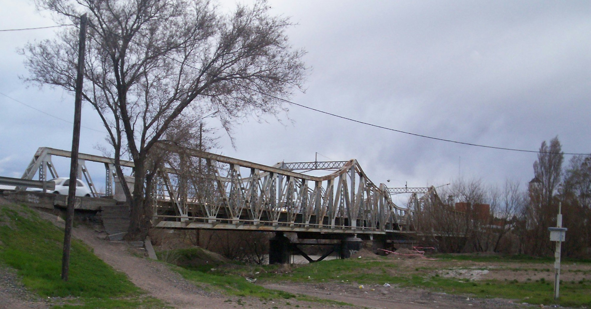 Puente viejo sobre el Rio Chubut, Rawson, Chubut